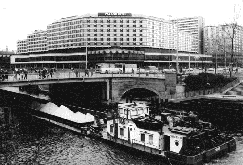 ADN-ZB Junge 15.4.85 Berlin: Neues Wahrzeichen Zu allen Jahreszeiten herrscht auf und über dem Wasser an der Liebknechtbrücke ein reger Verkehr. Seit seiner Fertigstellung 1979 ist das Palasthotel mit 1200 öffentlichen Gaststättenplätzen zu einem der beliebtesten Treffpunkte der Hauptstädter und ihrer Gäste geworden.